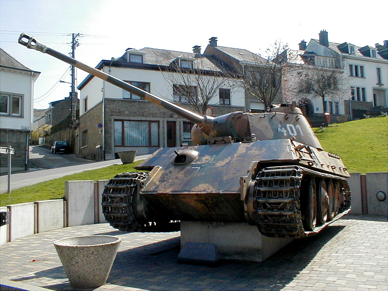 Char Panther V se trouvant à Houffalize